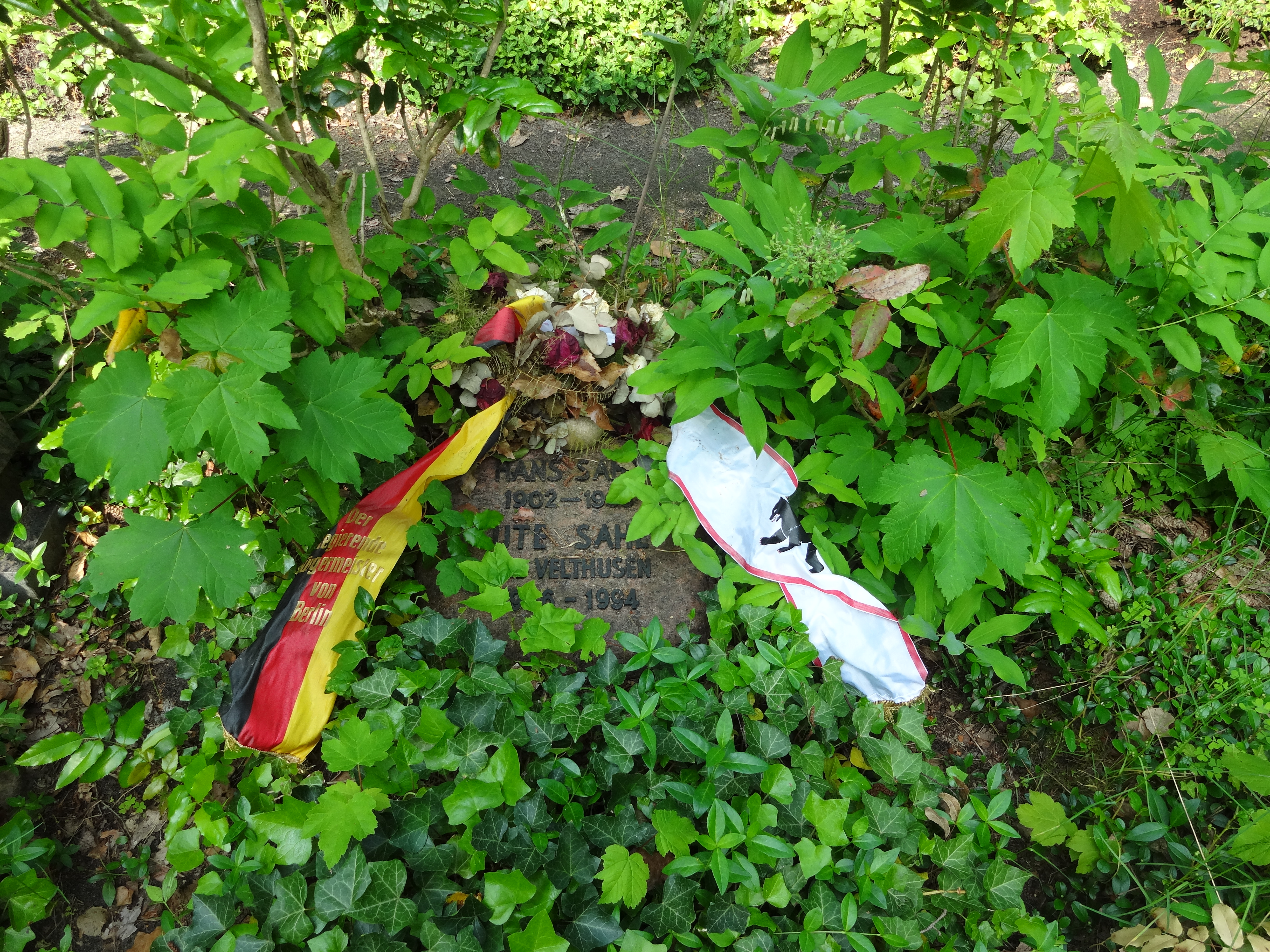 Grab des Schriftstellers Hans Sahl auf dem Friedhof Heerstraße in Berlin; Ehrengrab